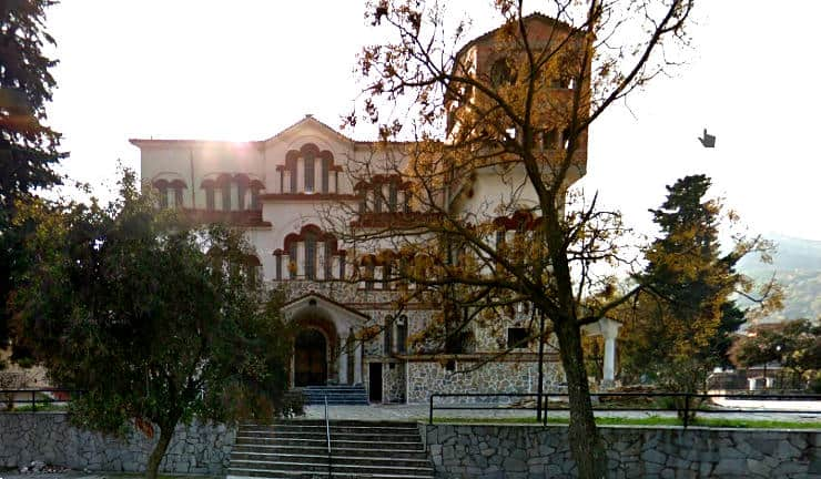 Omolio-larissa-beach